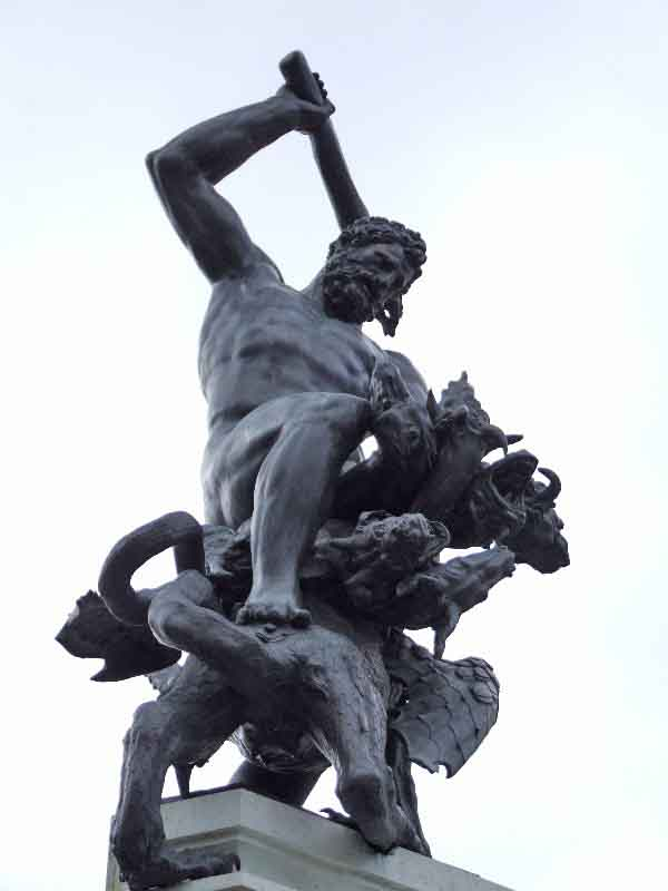 Augsburg Herkulusbrunnen in der Maximilianstraße